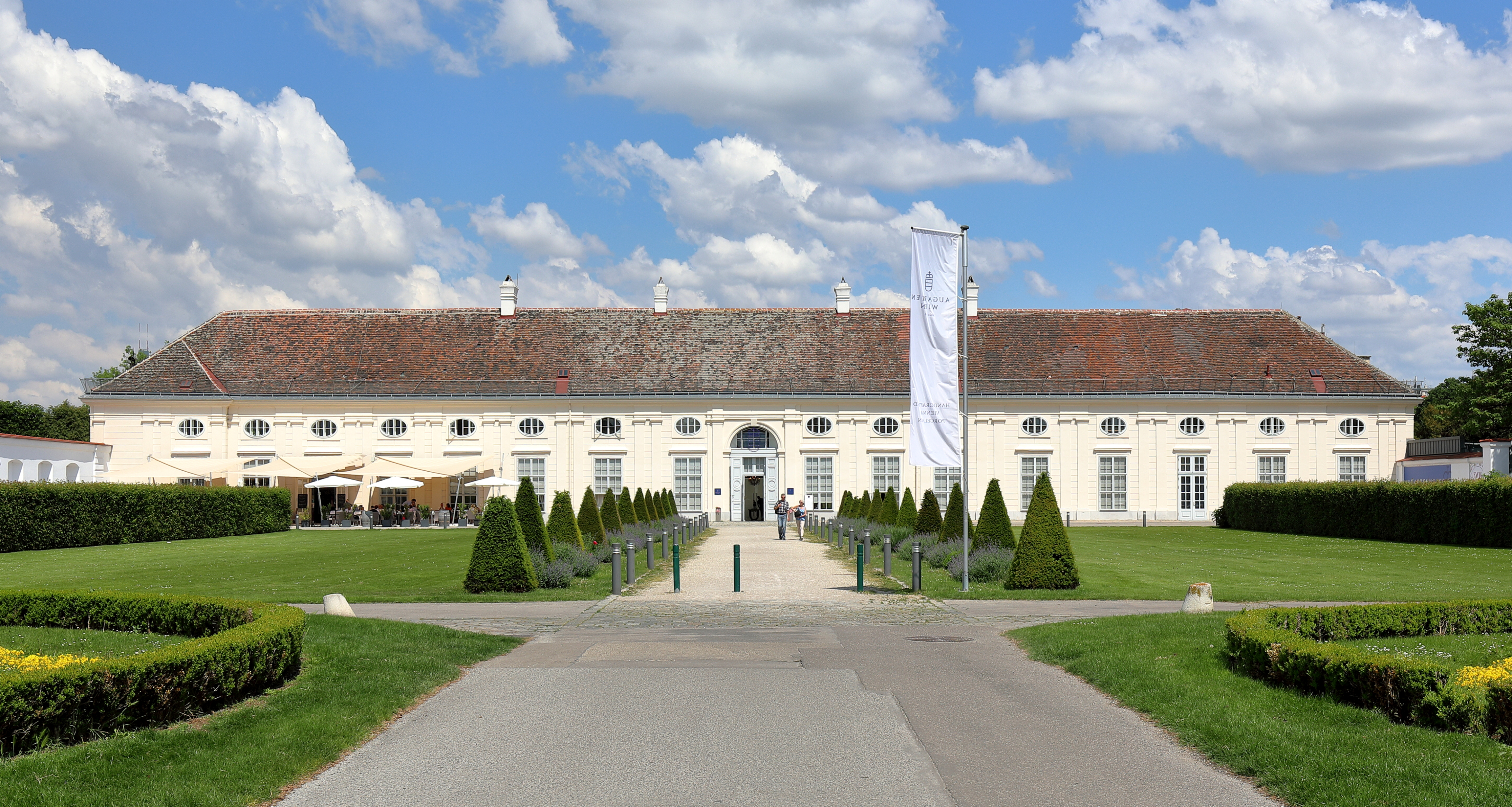 Das Schloss Augarten bzw. die Porzellanmanufaktur Augarten im 2. Wiener Gemeindebezirk Leopoldstadt. Das ursprüngliche Schloss wurde im Zuge der 2. Wiener Türkenbelagerung 1683 zerstört. Kaiser Joseph I. ließ 1705 auf den Resten des nordöstlichen Seitenflügels einen länglichen Saalbau errichten. Seit 1923 ist die Wiener Porzellanmanufaktur darin untergebracht, die darin aktuell (2018) ein Museum betreibt.